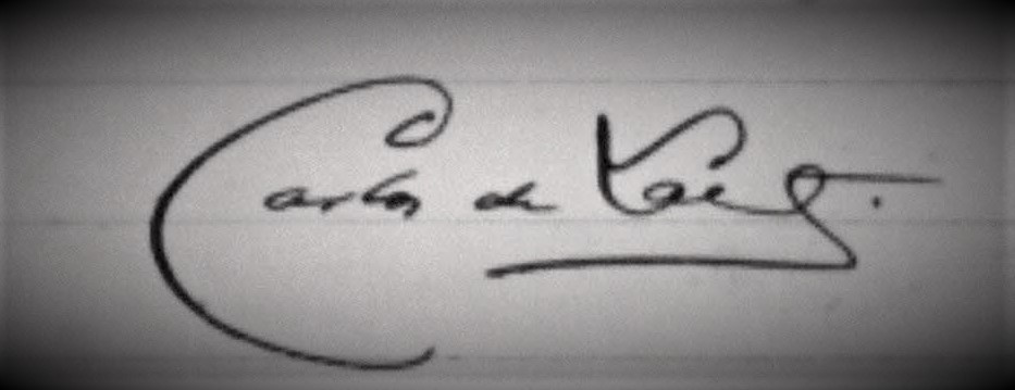 Assinatura de Carlos de Laet, que foi da Academia Brasileira de Letras.